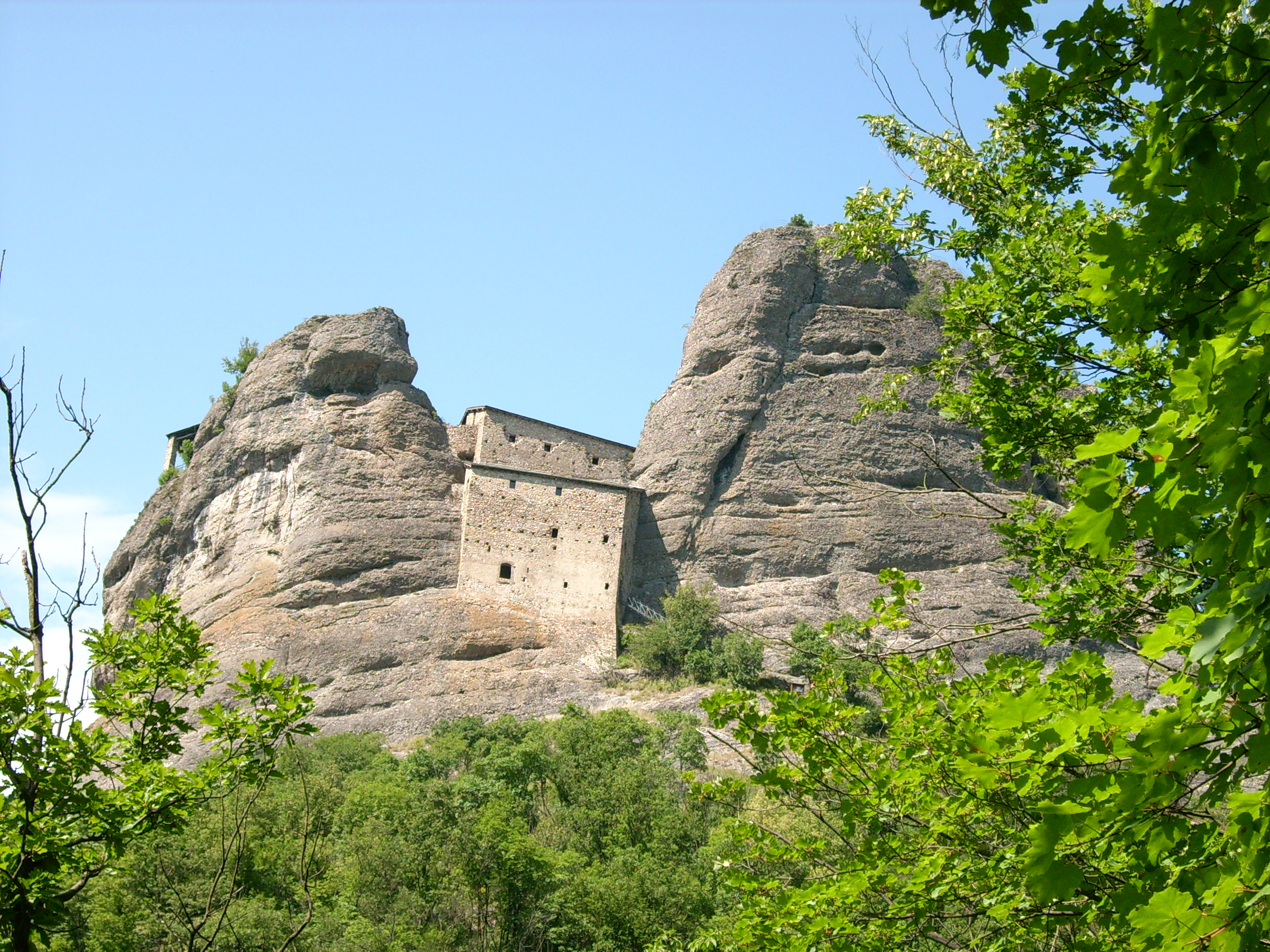 Castello della Pietra presso Vobbia, Liguria, Italia